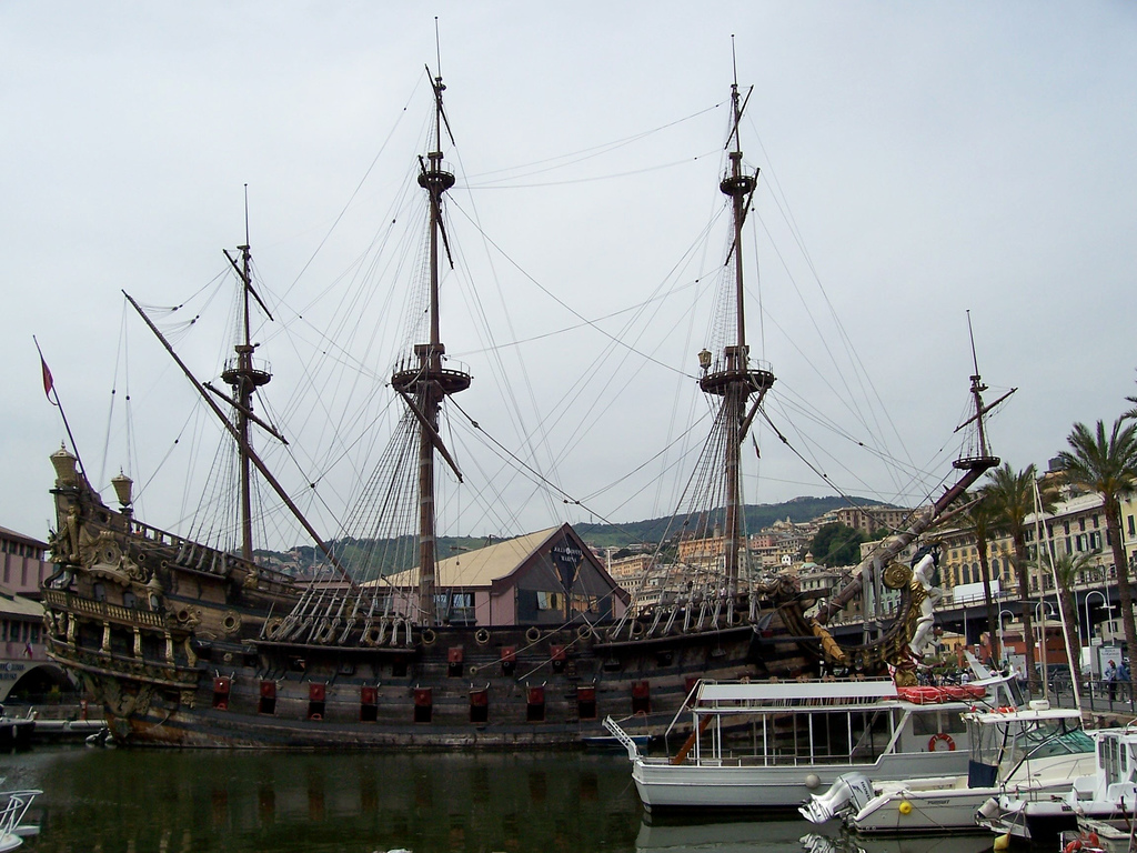 Roman Polanski Ship